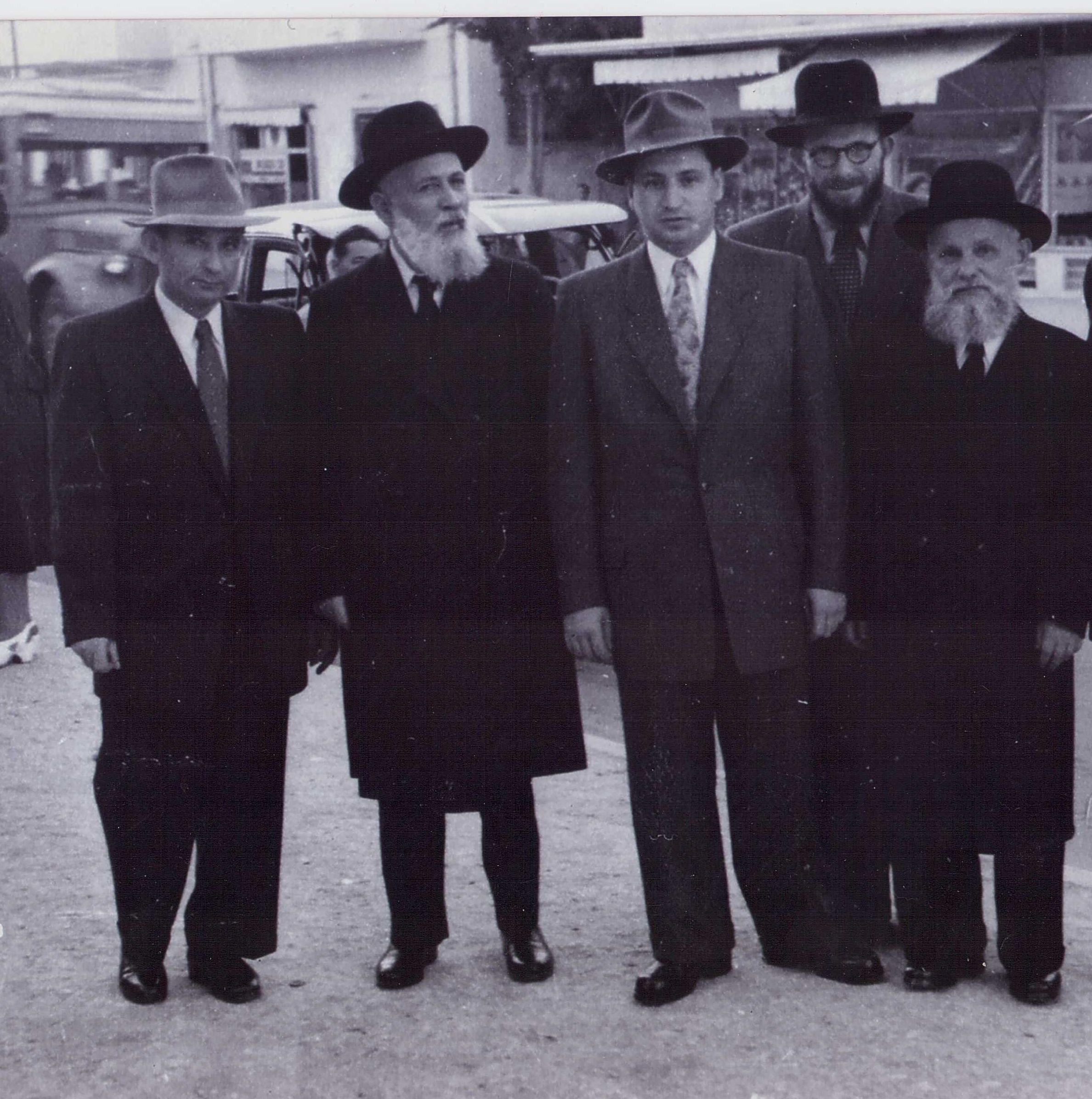 משפחתה של שפרה ברוכסון-ארביב: (מימין לשמאל) הרב אברהם סוחובולסקי, שלמה ברוכסון, הרב יצחק ברוכסון, יהודה מקבי, מאחור הרב חיים גולדוויכט, תל אביב 1950.